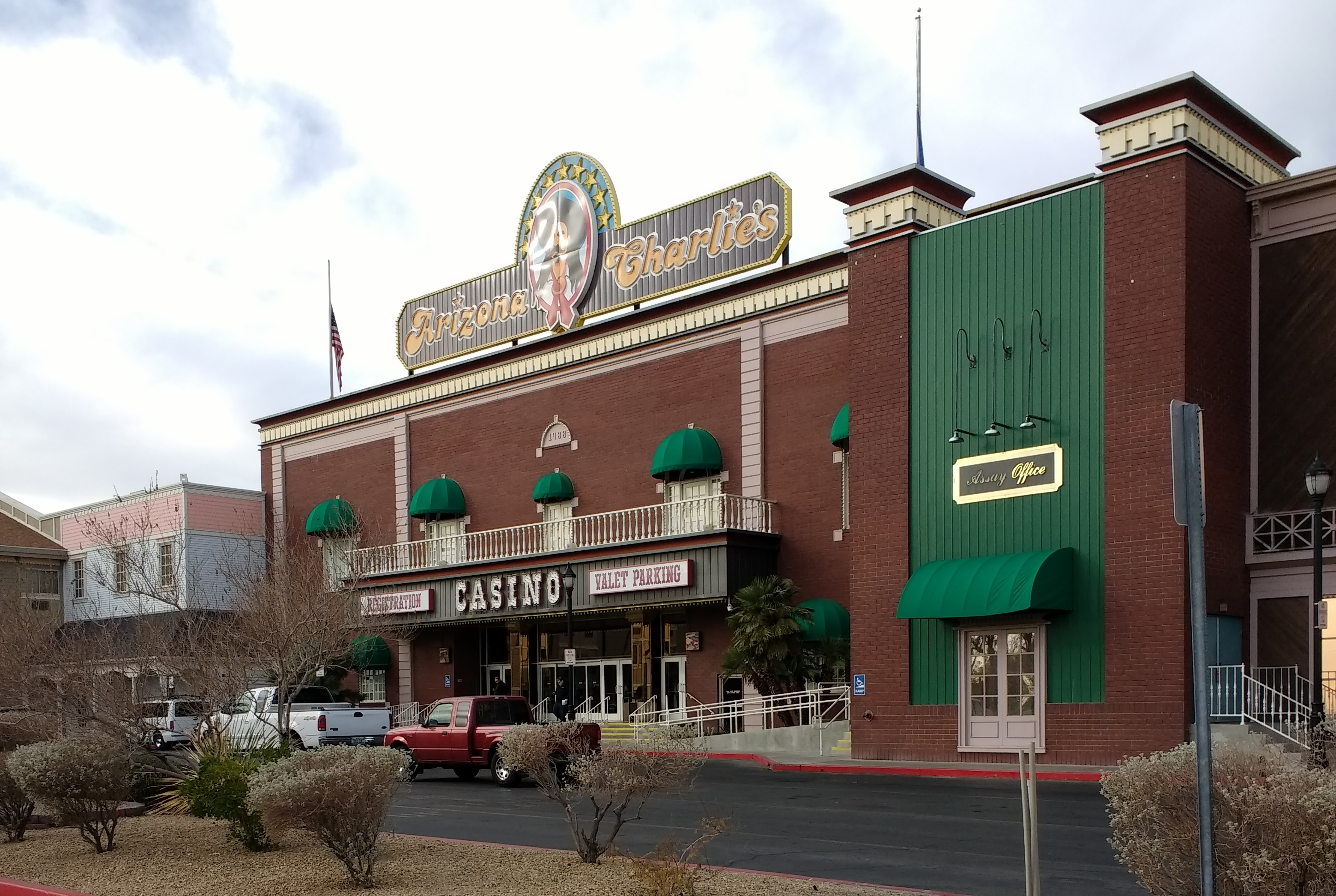 Arizona Charlie's Decatur in Las Vegas, Nevada.